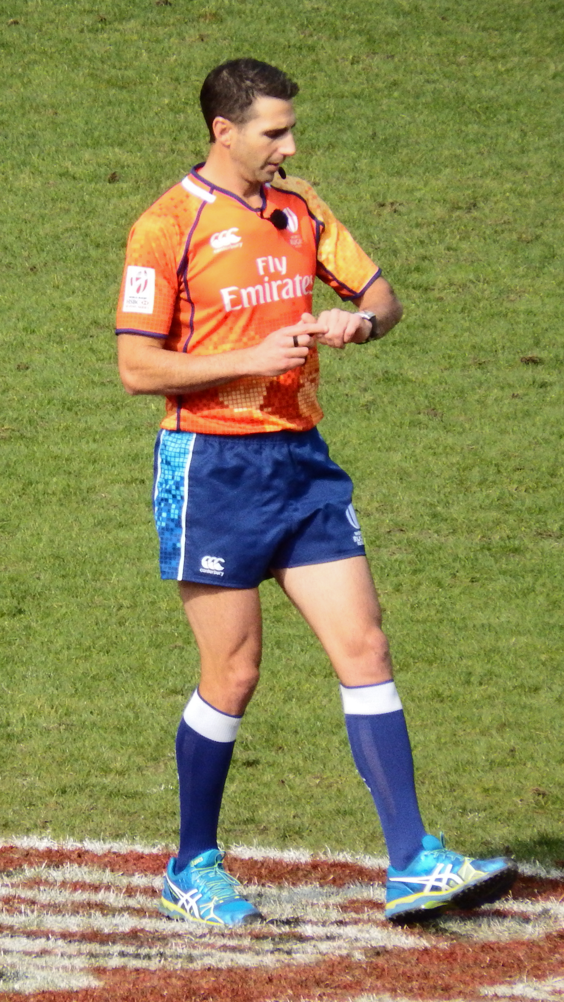 Paris Sevens 2016 — 15 May 2016, stade Jean-Bouin. Match between: Argentina — France